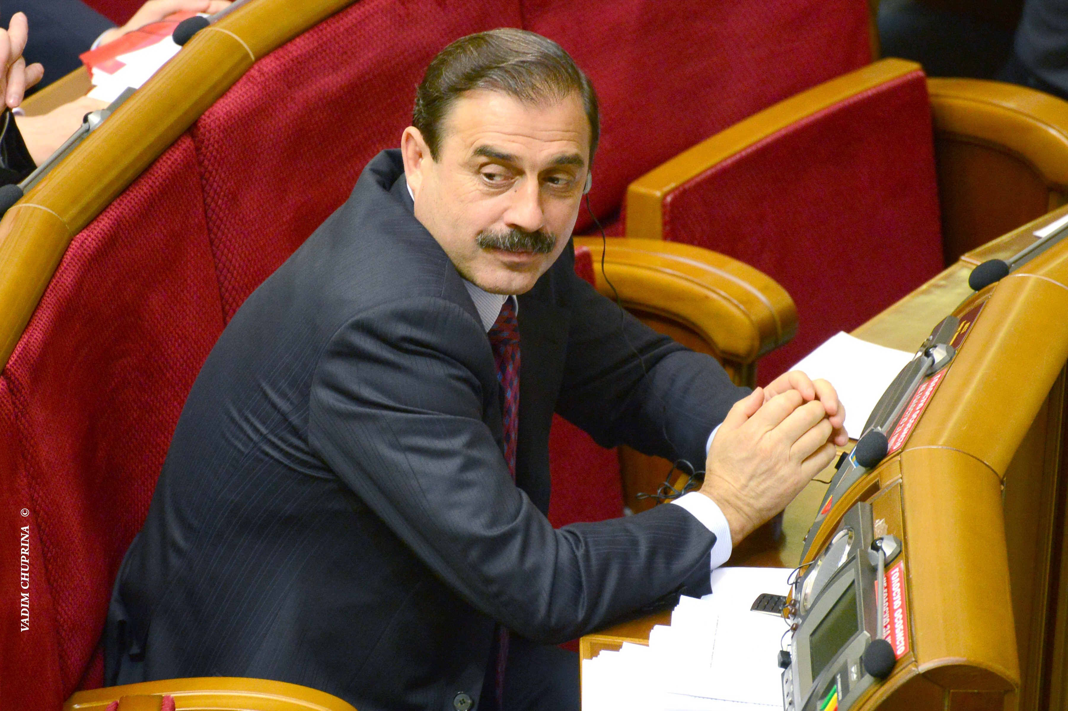 ВЕРХОВНА РАДА УКРАЇНИ 2013 , фото Вадим Чуприна